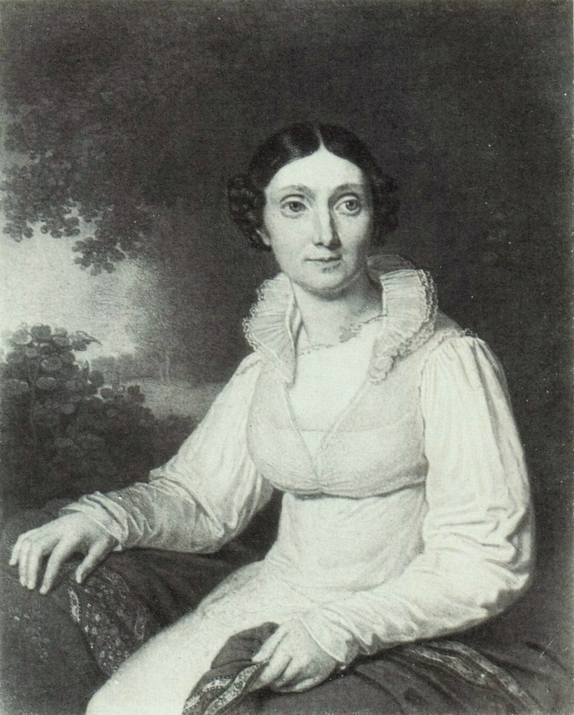 Антуанетта Станиславовна Витгенштейн, ур. Снарская (1779—1855), статс-дама.